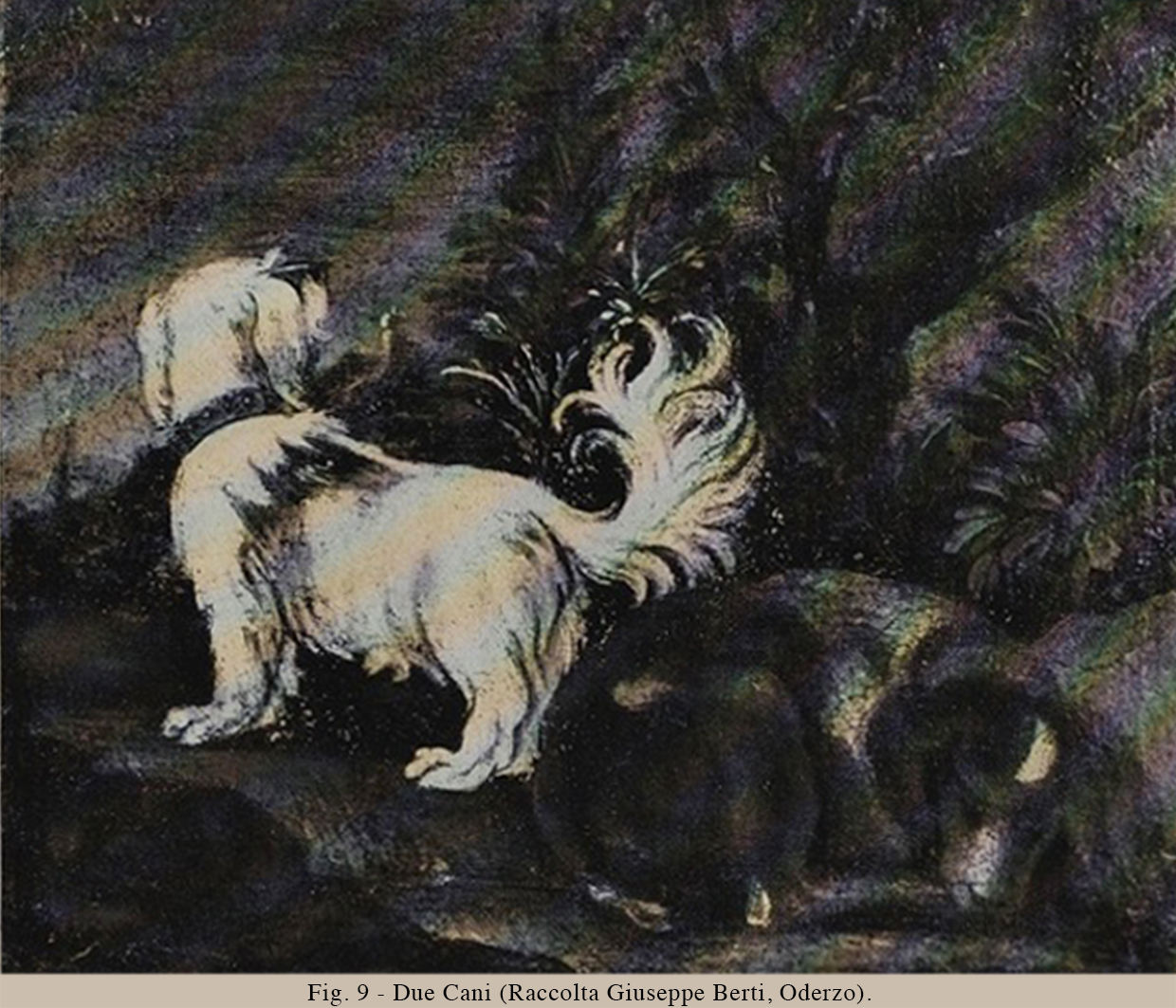 Francesco Guardi Coll. Giuseppe Berti Oderzo